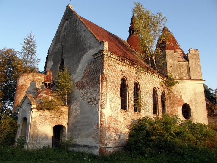 Костел Св. Марії Магдалини (1924) у с. Вовків Пустомитівського р-ну на Львівщині. Збудований за проектом Броніслава Віктора (1886-1961) у стилі арт-деко (охоронний номер 1946-М). За радянських часів тут був склад мінеральних добрив. В костелі знімали перший український детектив «Злочин з багатьма невідомими» за мотивами твору Івана Франка.